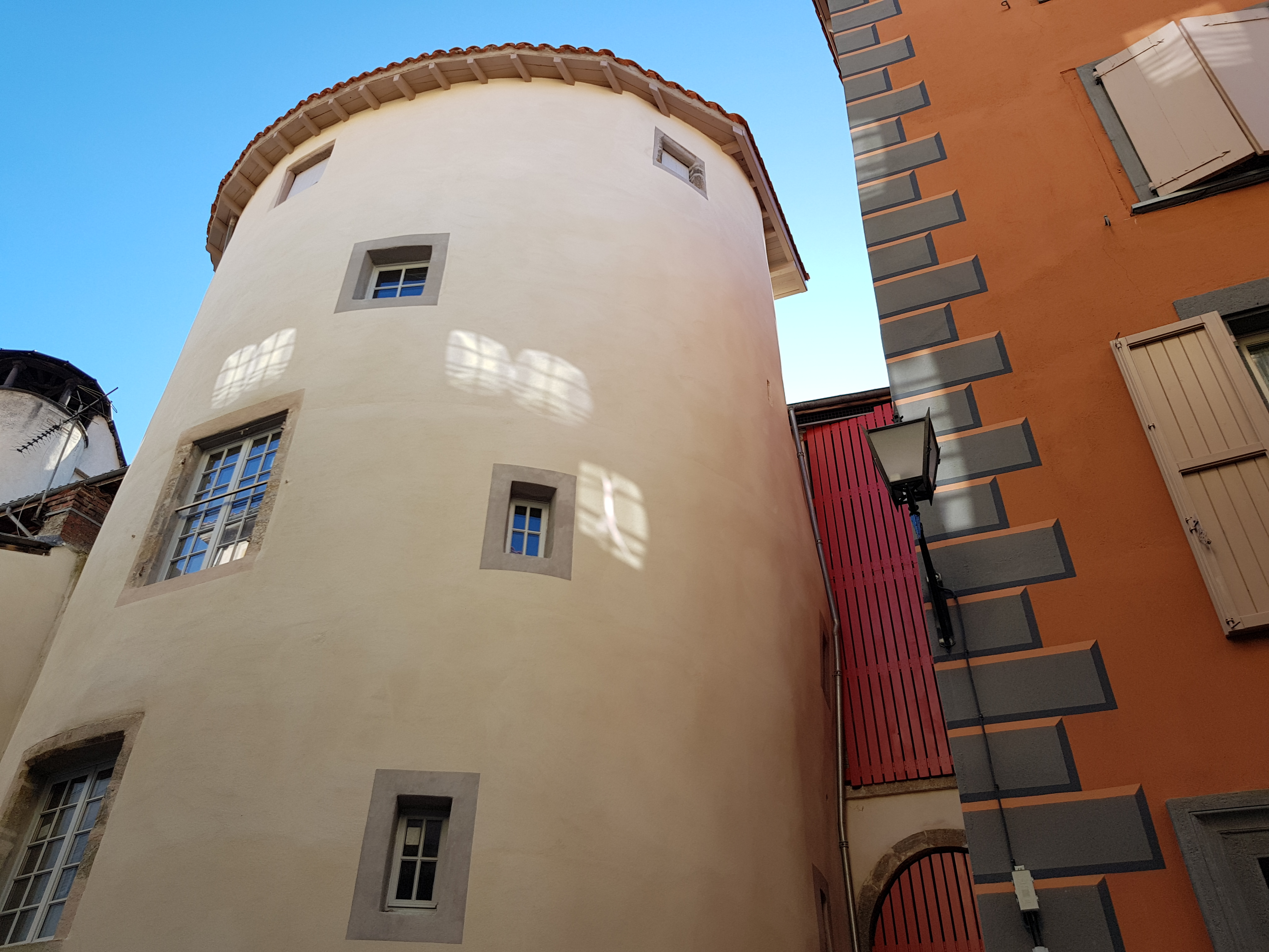 La Tour Pignat dans la cité médiévale de Thiers